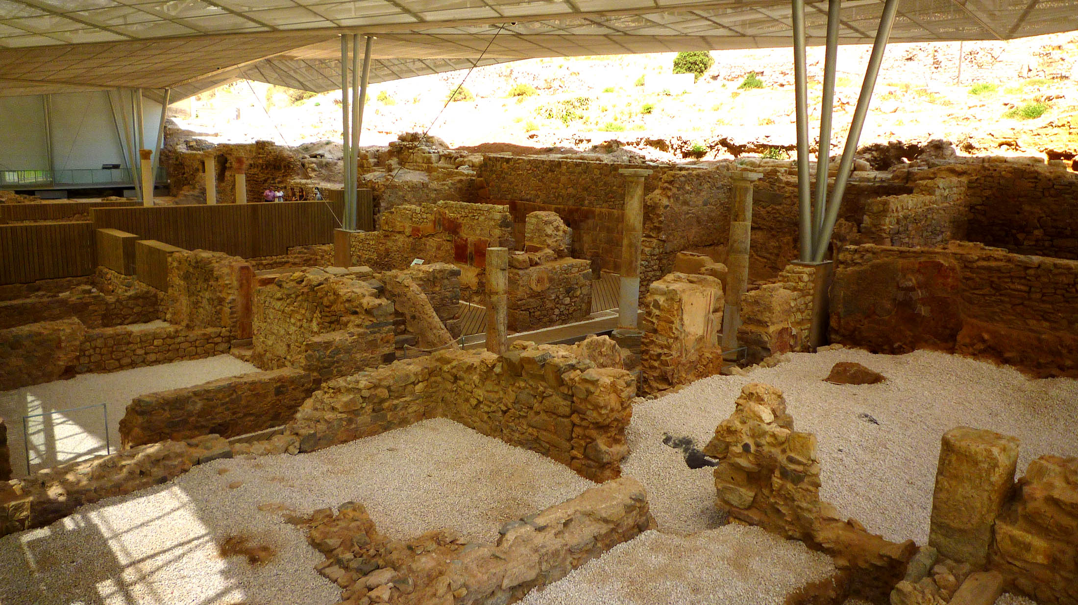 Edificio del atrio toscano en el barrio del foro romano de Cartagena (España).